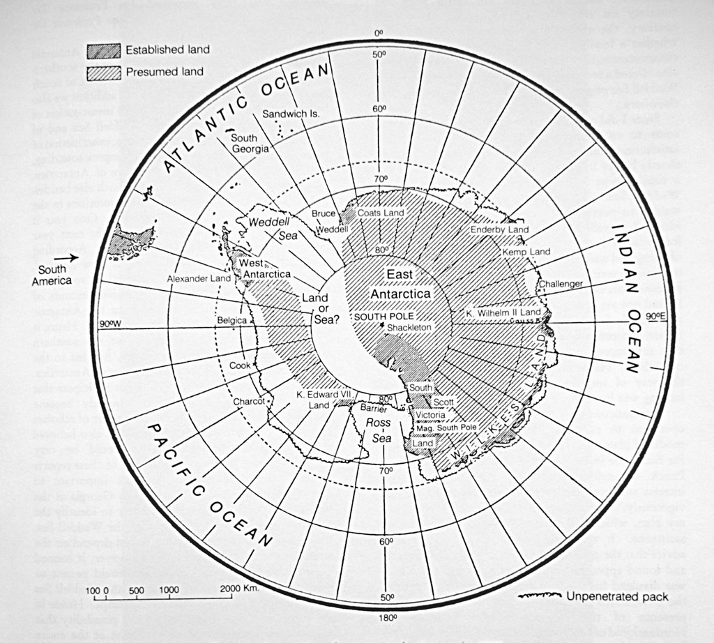 Карта-схема Антарктиды по представлениям Вильгельма Фильхнера